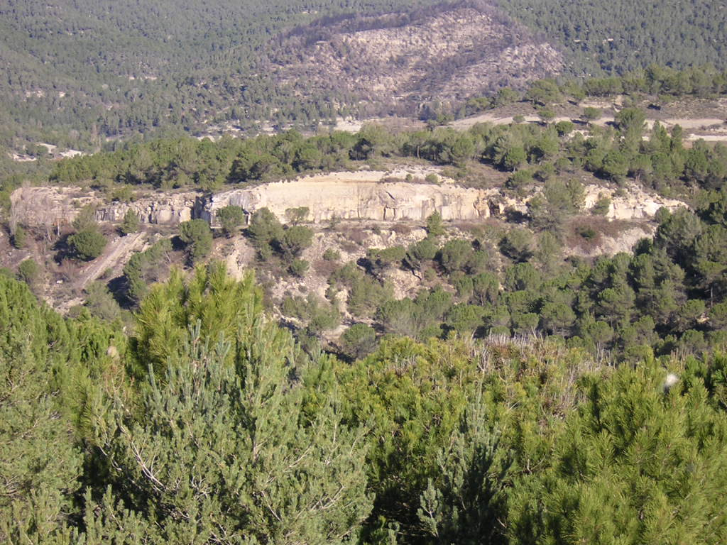 Pedrera de Coll Girant (Monistrol de Calders, Moianès)